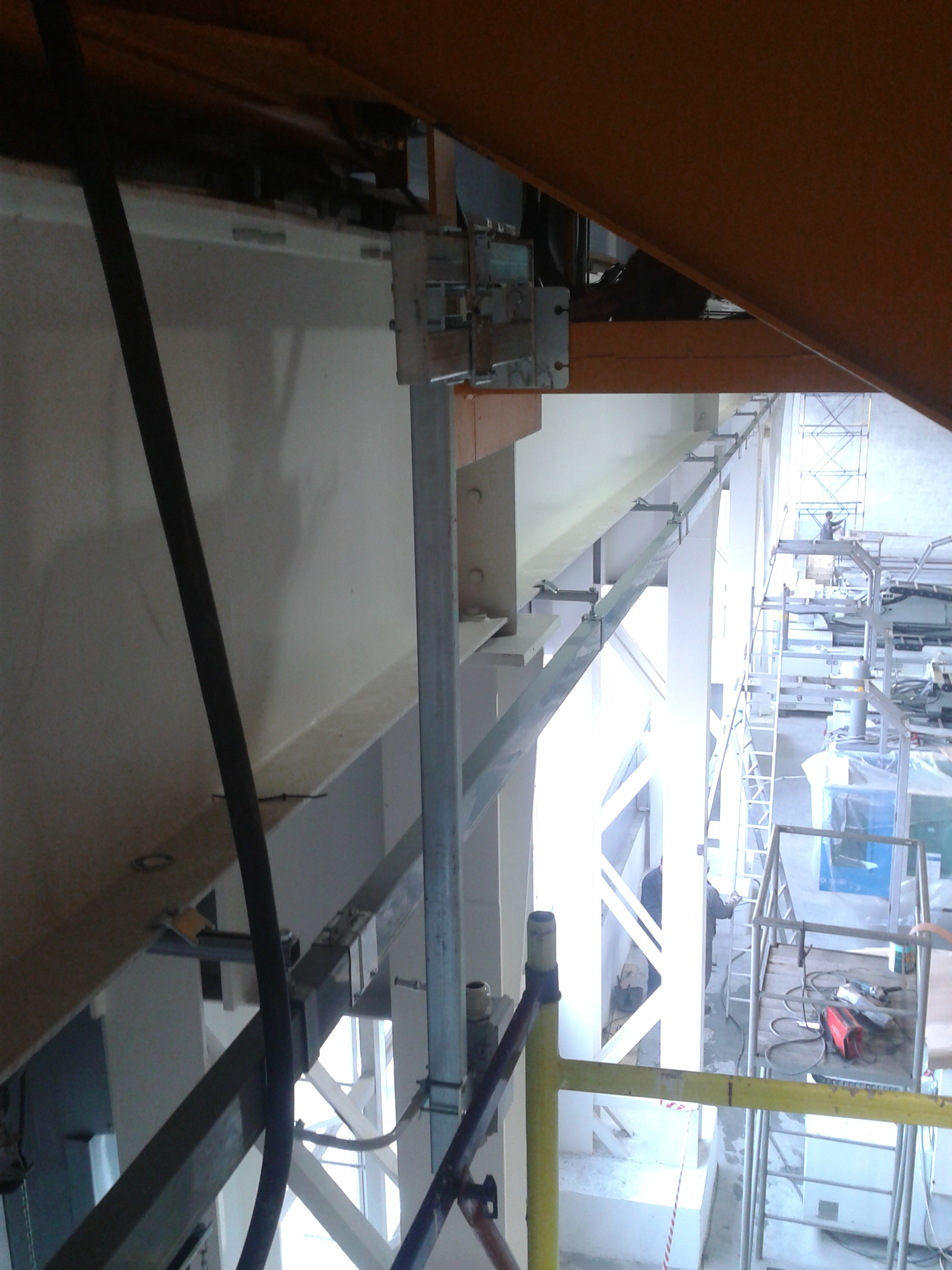 Napajalni del mostnega dvigala, akapp/swf 30t+30t Russia/Kaluga